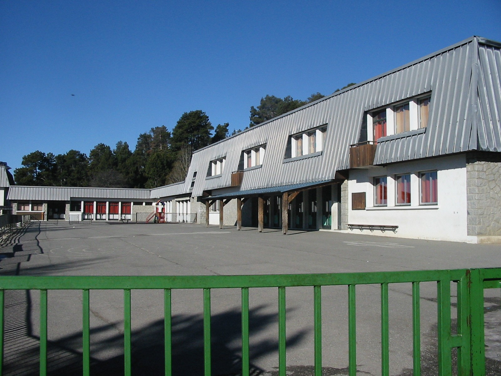 Ecole primaire de la Forêt, Font-Romeu, Pyrénées-Orientales, France